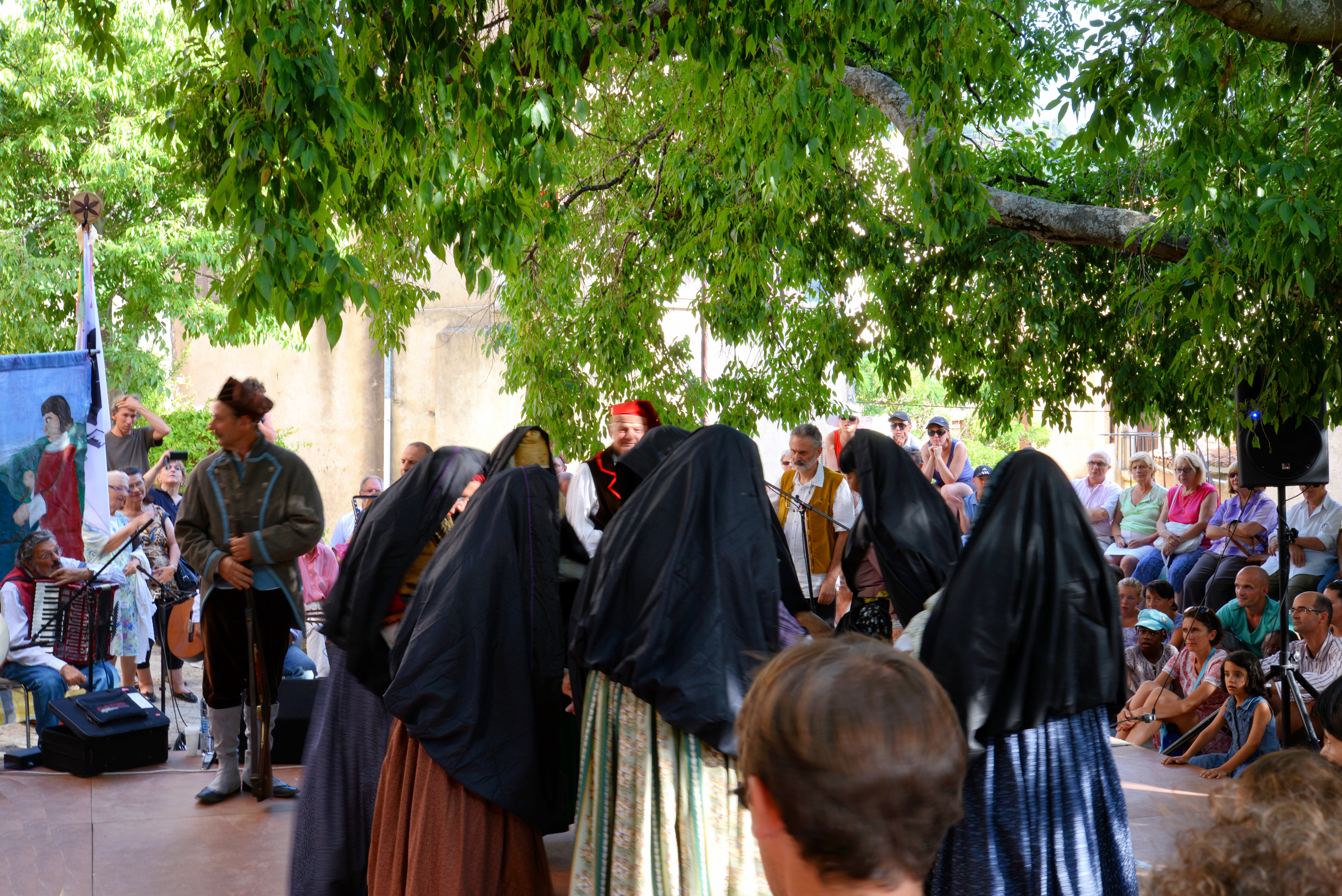 Aregno, Balagne (Haute-Corse) - Représentation de membres de l'association culturelle Ochju a Ochju de Corte à la foire de l'Amandier 2013